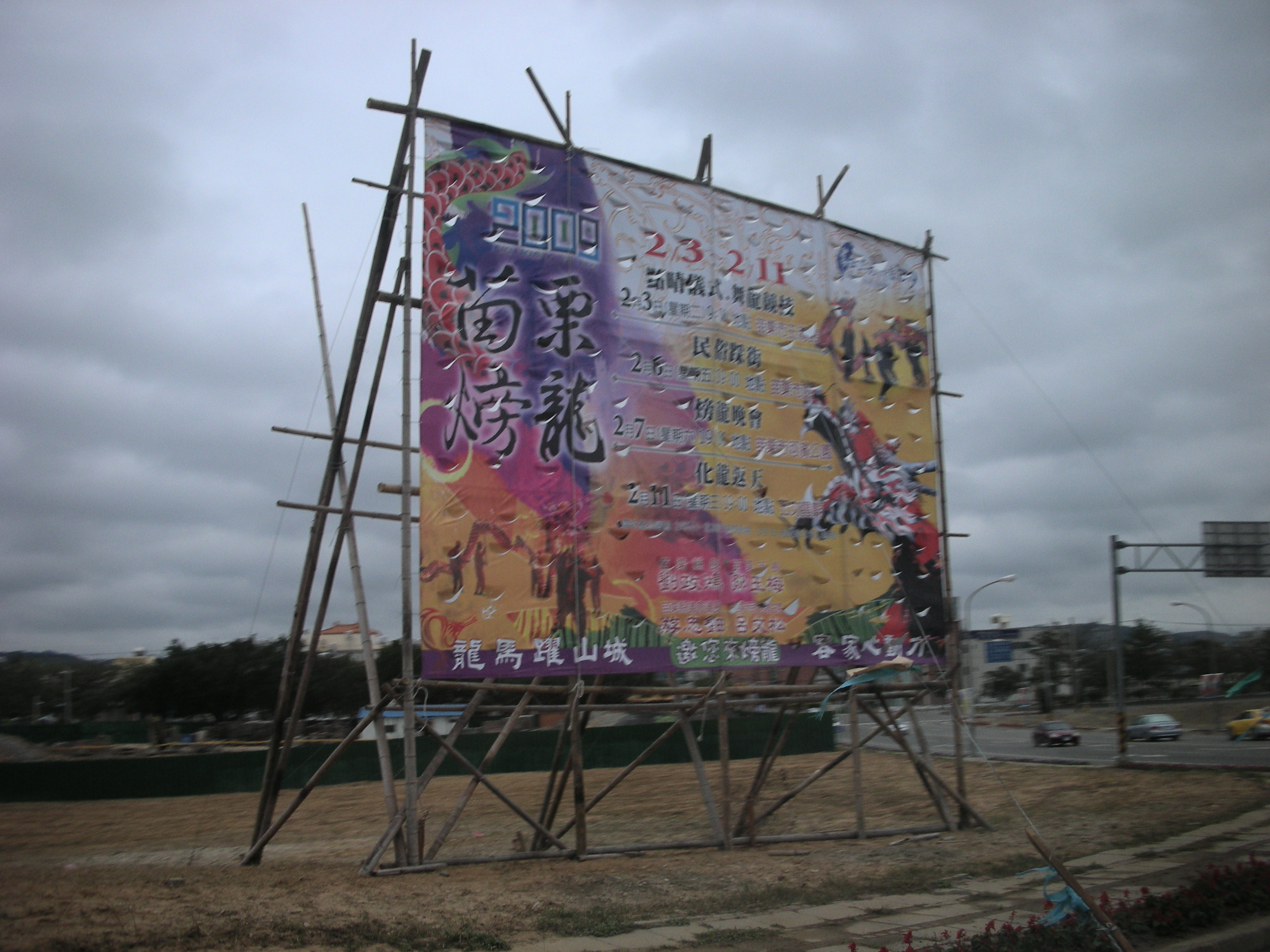 車上拍攝2009苗栗𪹚龍廣告帆布